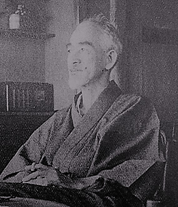 志賀直哉